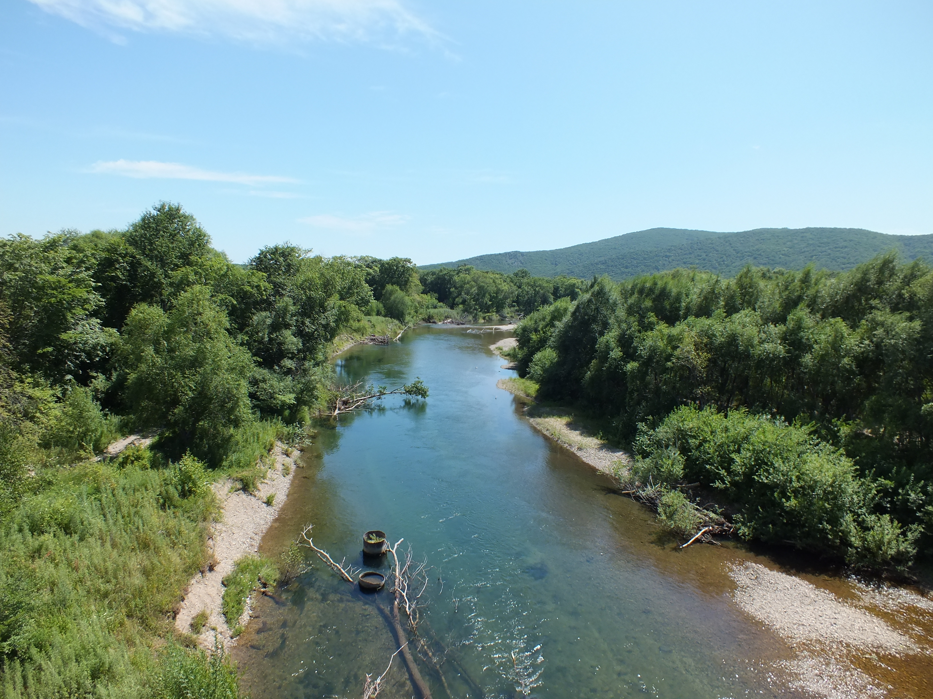 Река Арзамасовка у села Пермское